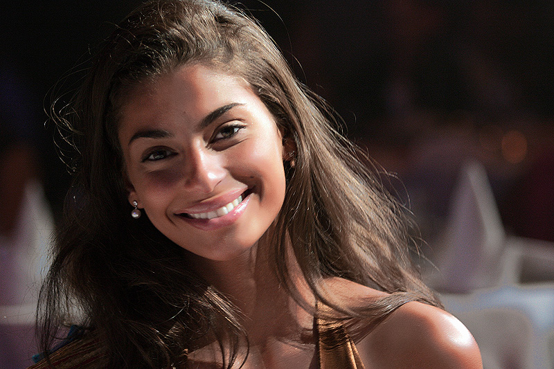 Photo de Tatiana Silva, jury pour l'élection de Miss Liège en 2005